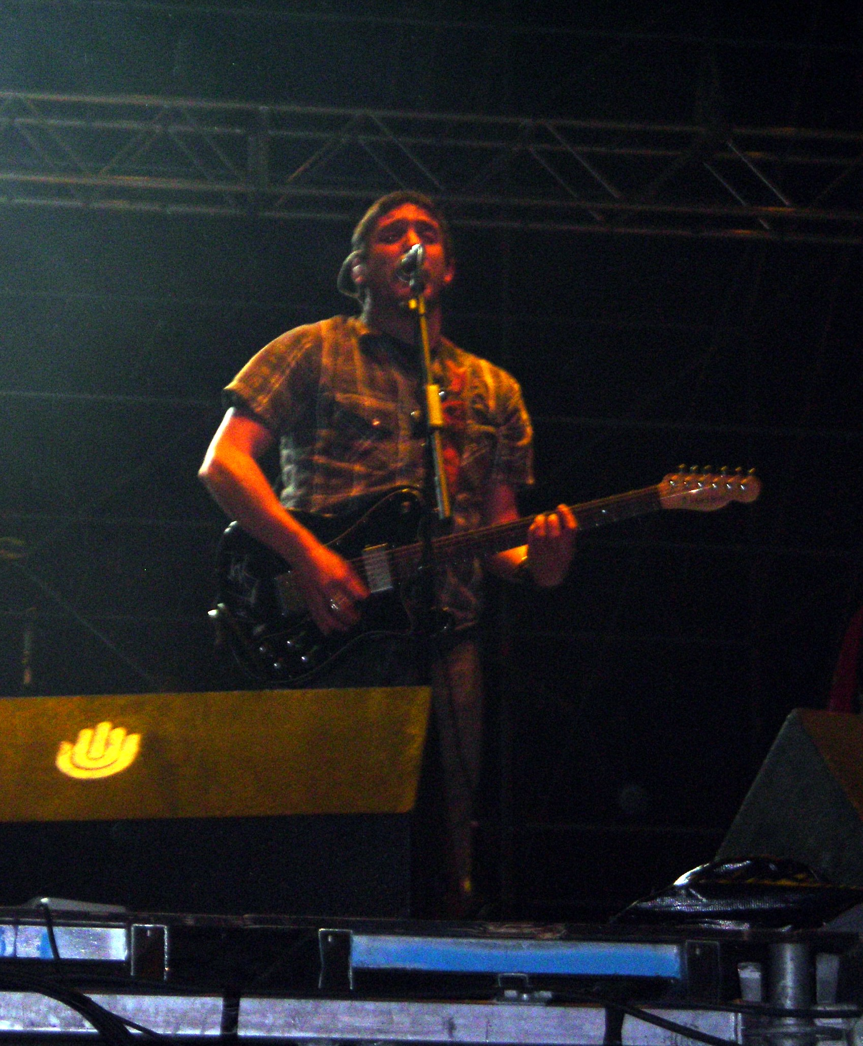 Sebastián Teysera de La Vela Puerca durante un momento de su actuación en el Extremúsika 2008